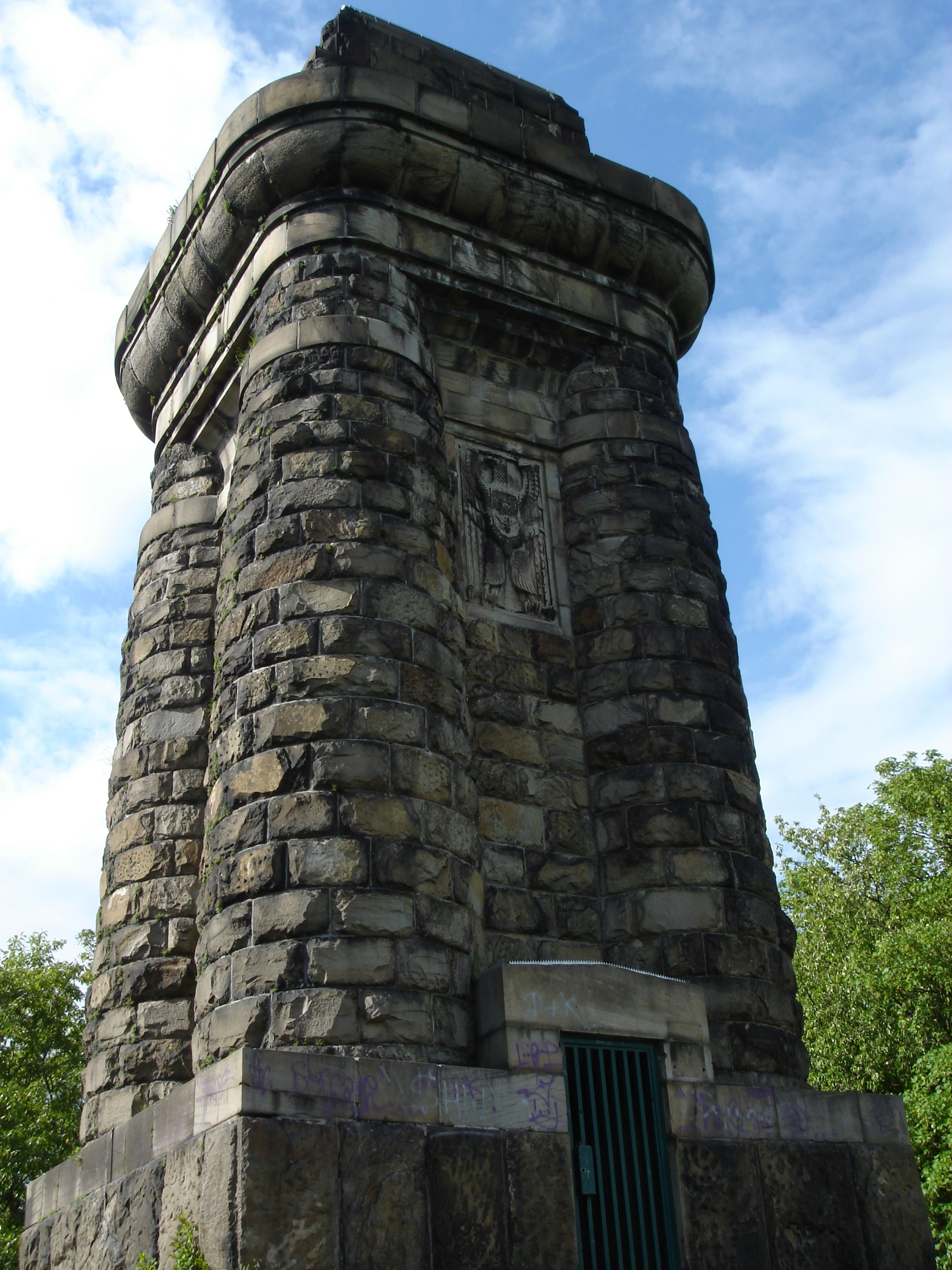 Bismarckturm Hagen